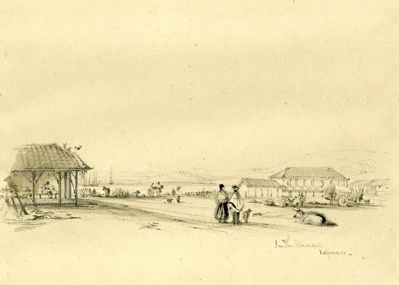 Plaza Orrego (actual Plaza Victoria), Valparaíso, Chile junto al mar y a la casa del canónigo Vicente Orrego, 1834.